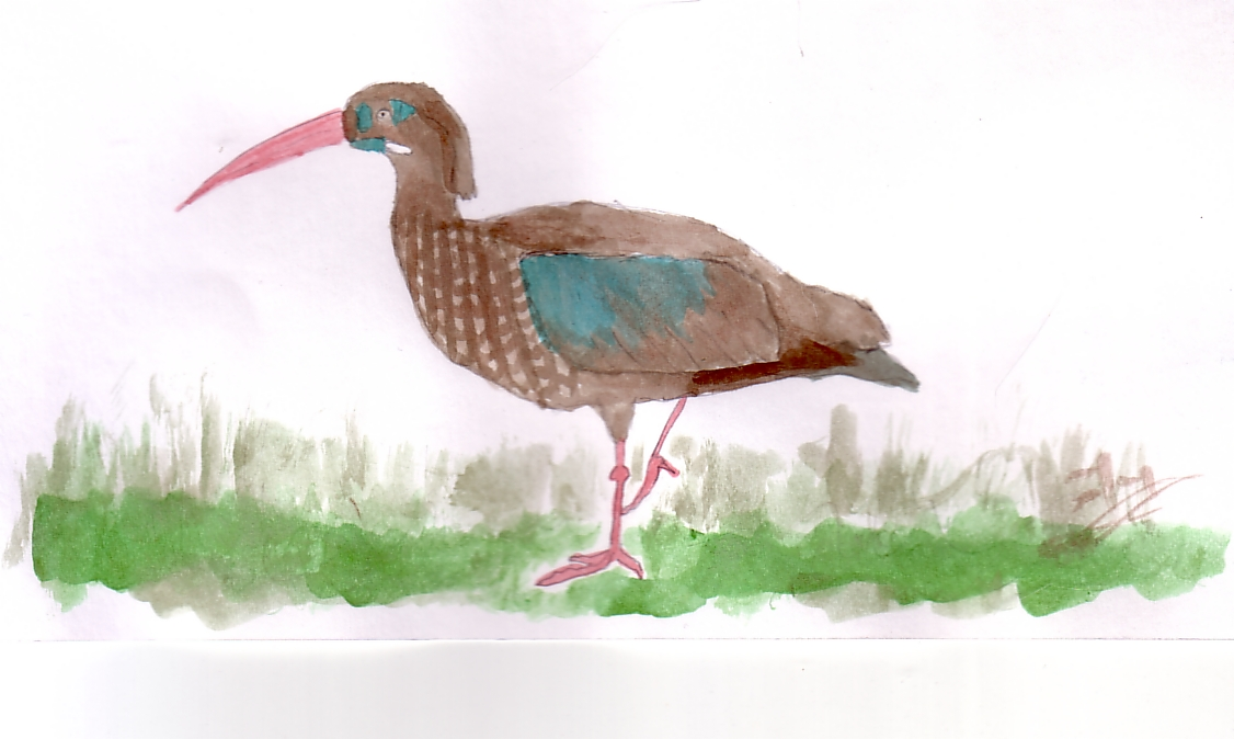 desegnaĵo de Makulbrusta ibiso